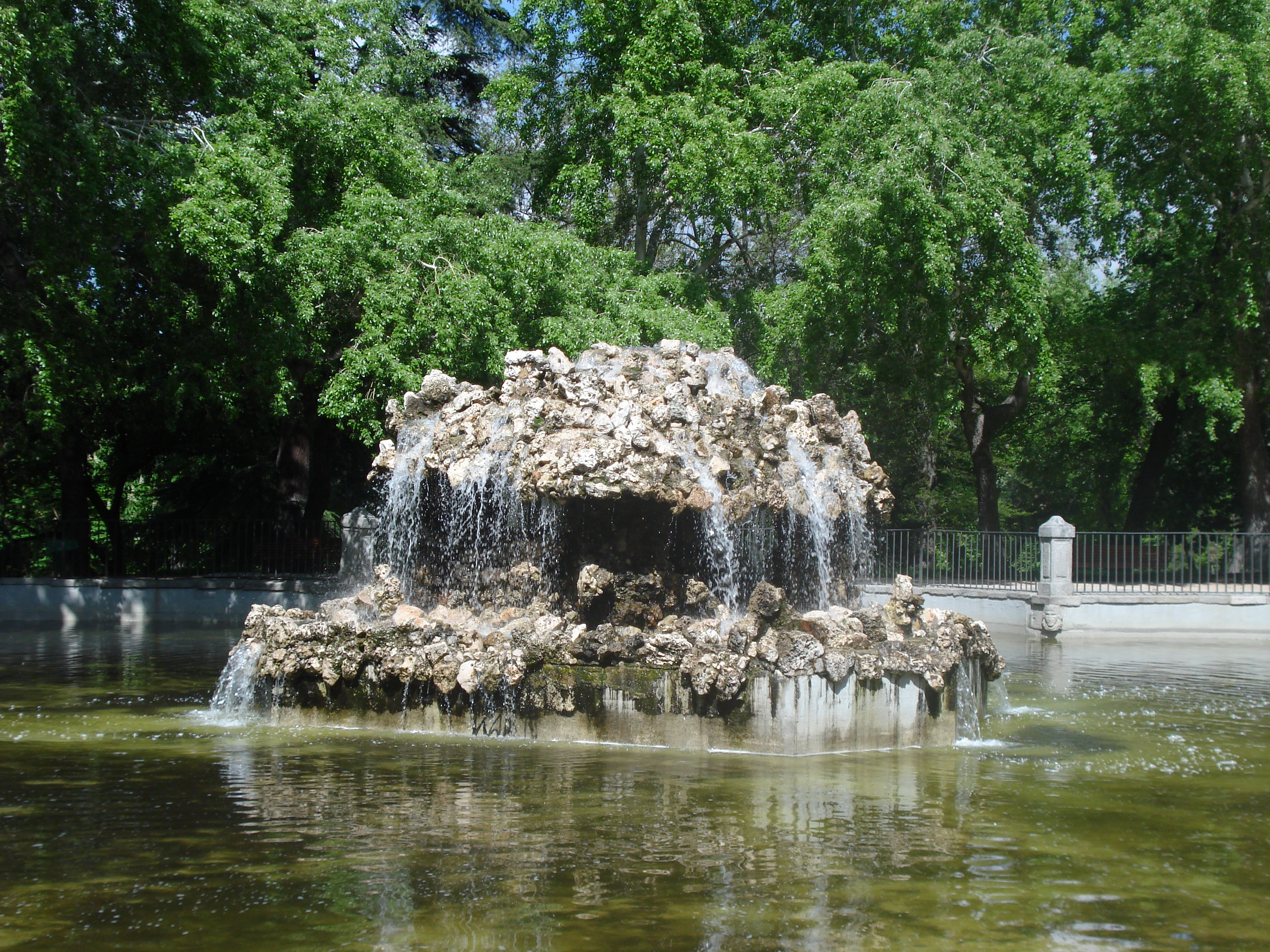 Fuente de rocalla en el centro del Estanque Ochavado (o de Campanillas). Parque del Buen Retiro Madrid.